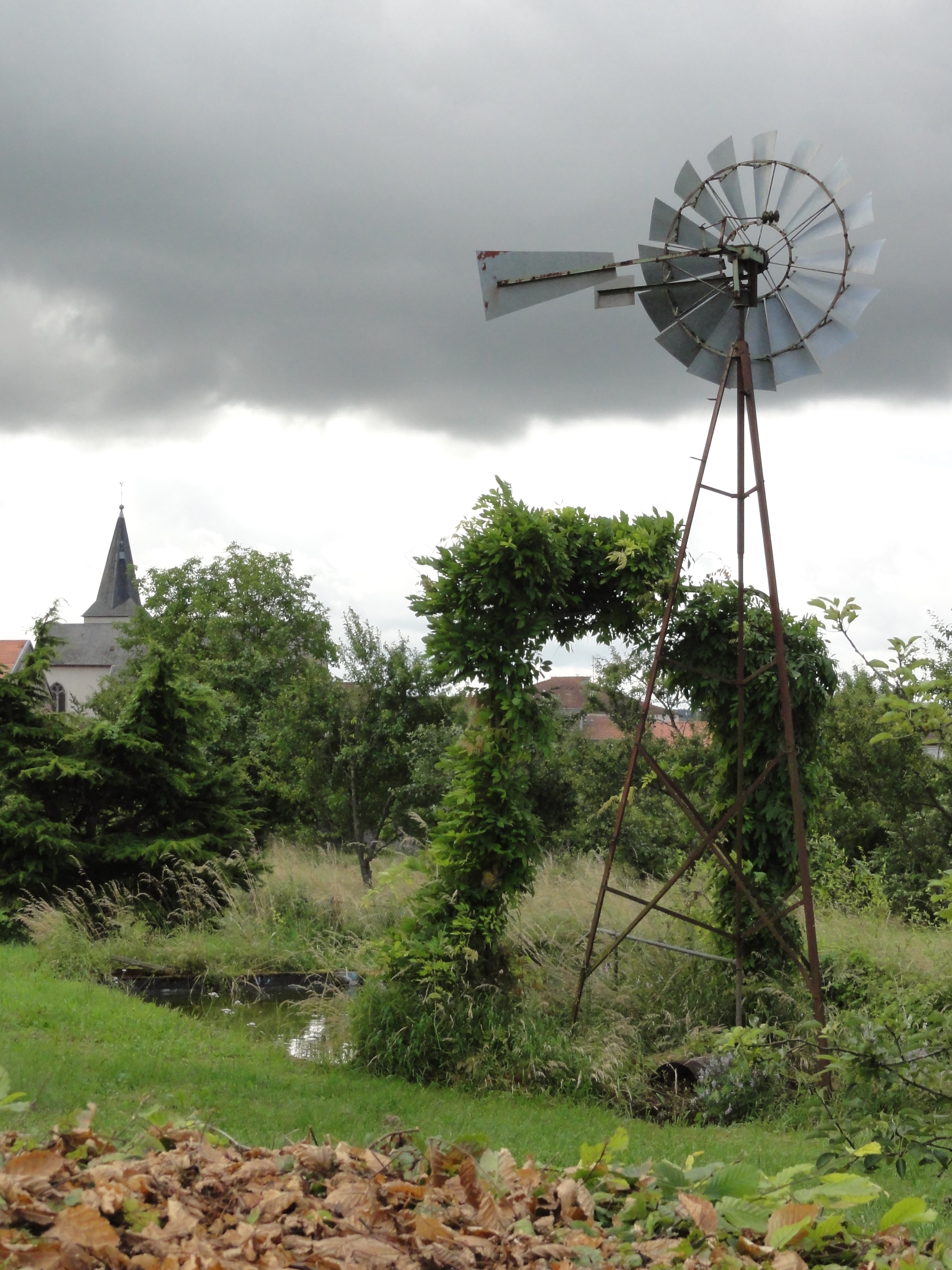 Raville-sur-Sânon (M-et-M) pompe-eolienne